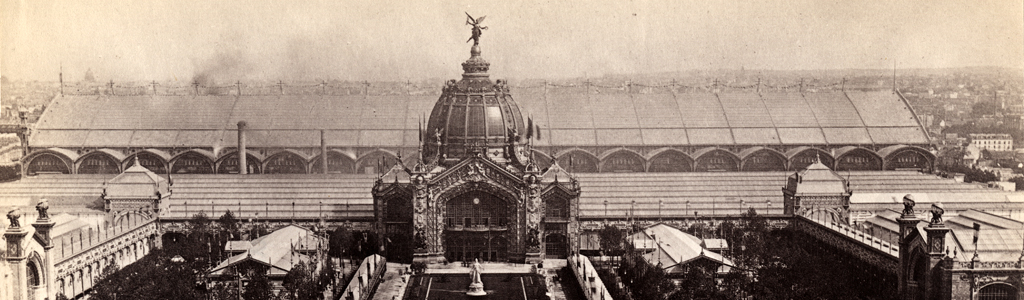 Cúpula central del Palacio de la Industria, con la Galería de las Máquinas situada justo por detrás